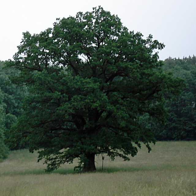 Chrástovský dub je památný strom u Nemilkova, západně od Velhartic.